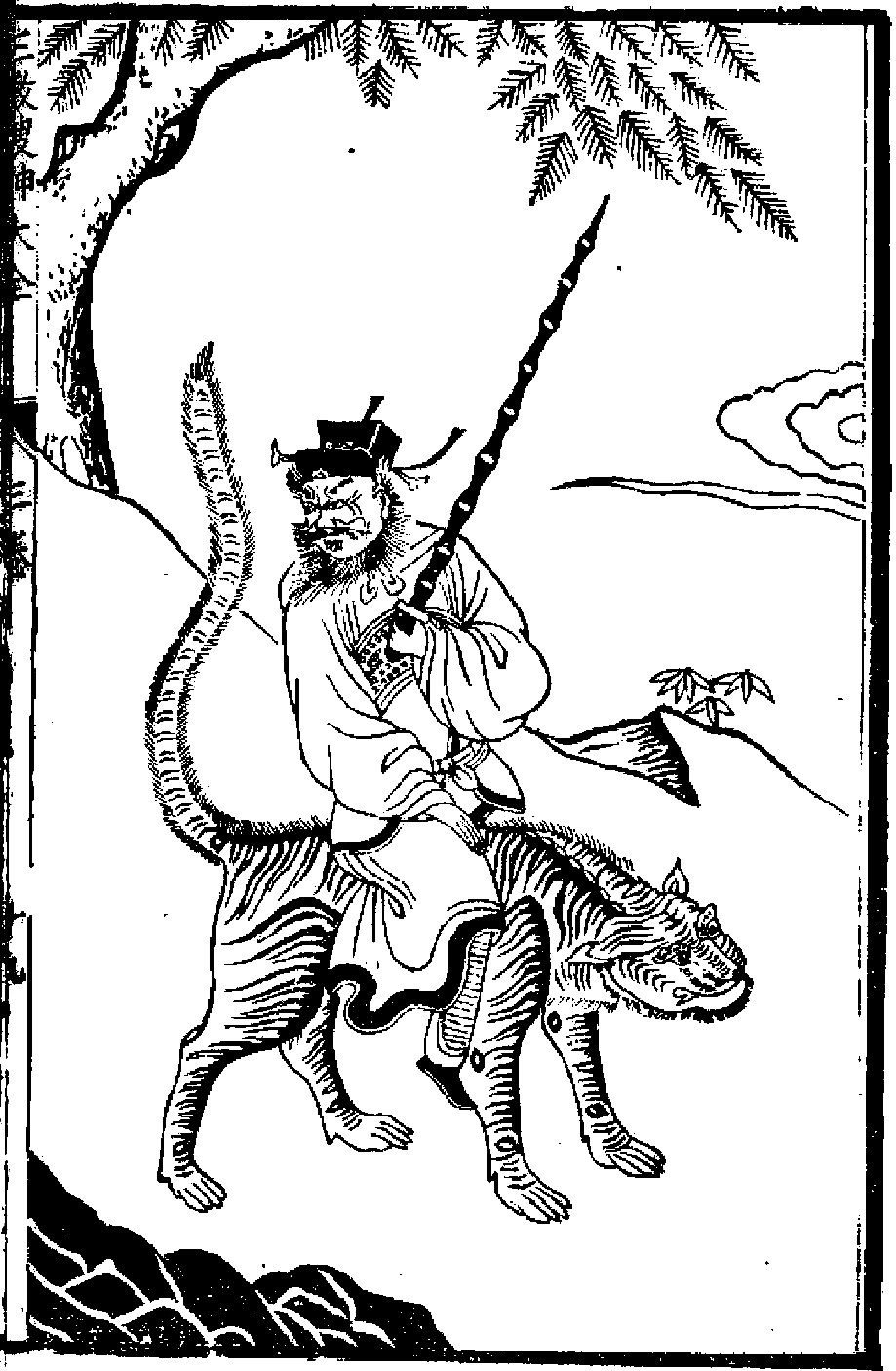 三教源流搜神大全第三卷. 趙公明法相 古書記載左手持鞭